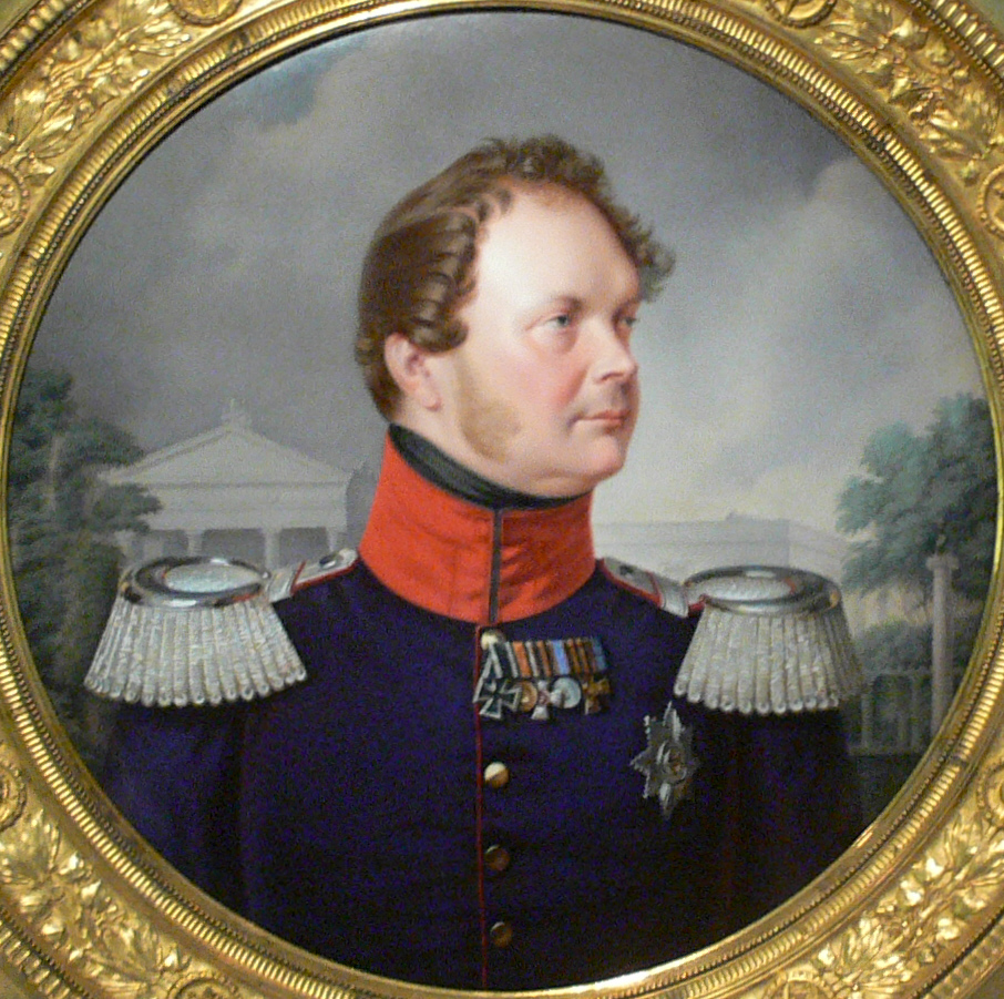 Bildnis Friedrich Wilhelm IV. von Preußen im Prunkrahmen; Königliches Gewerbeinstitut, Berlin 1842–1844; Bildnis: Porzellan mit Aufglasurmalerei Geschenk von P. C. W. Beuth an König Friedrich Wilhelm IV.